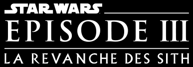 Logo du film Star Wars, épisode III : La Revanche des Sith réalisé par George Lucas, sortie en 2005.